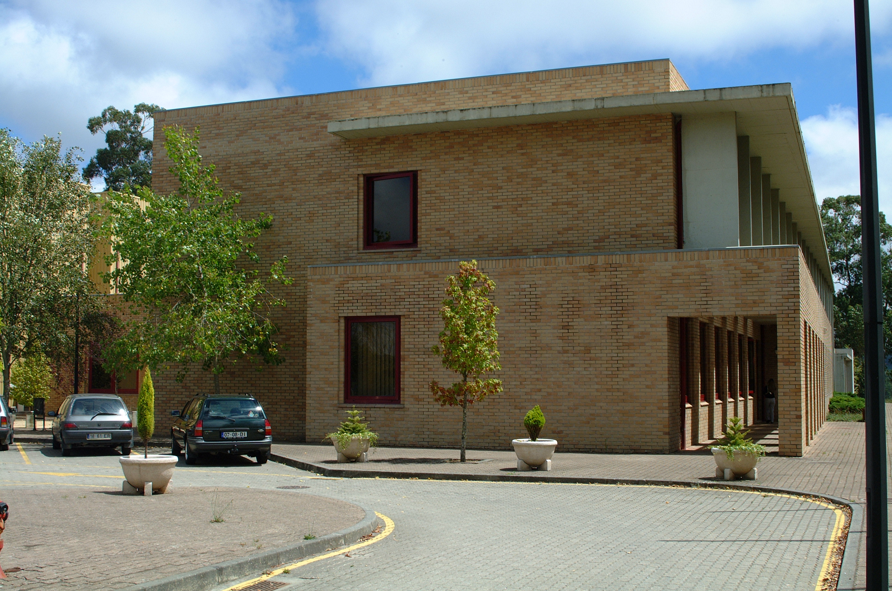 Imagem exterior do IDIT